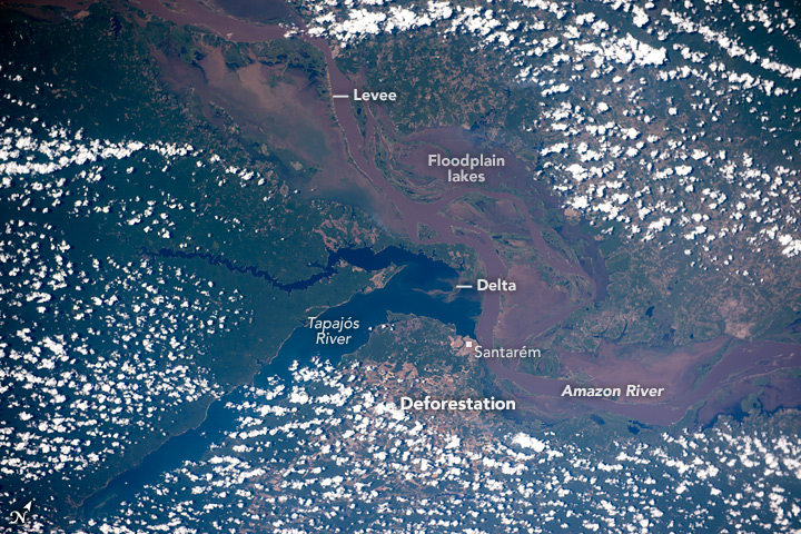 Confluencia del río Tapajós con el Amazonas, cerca de la ciudad de Santarem en Brasil